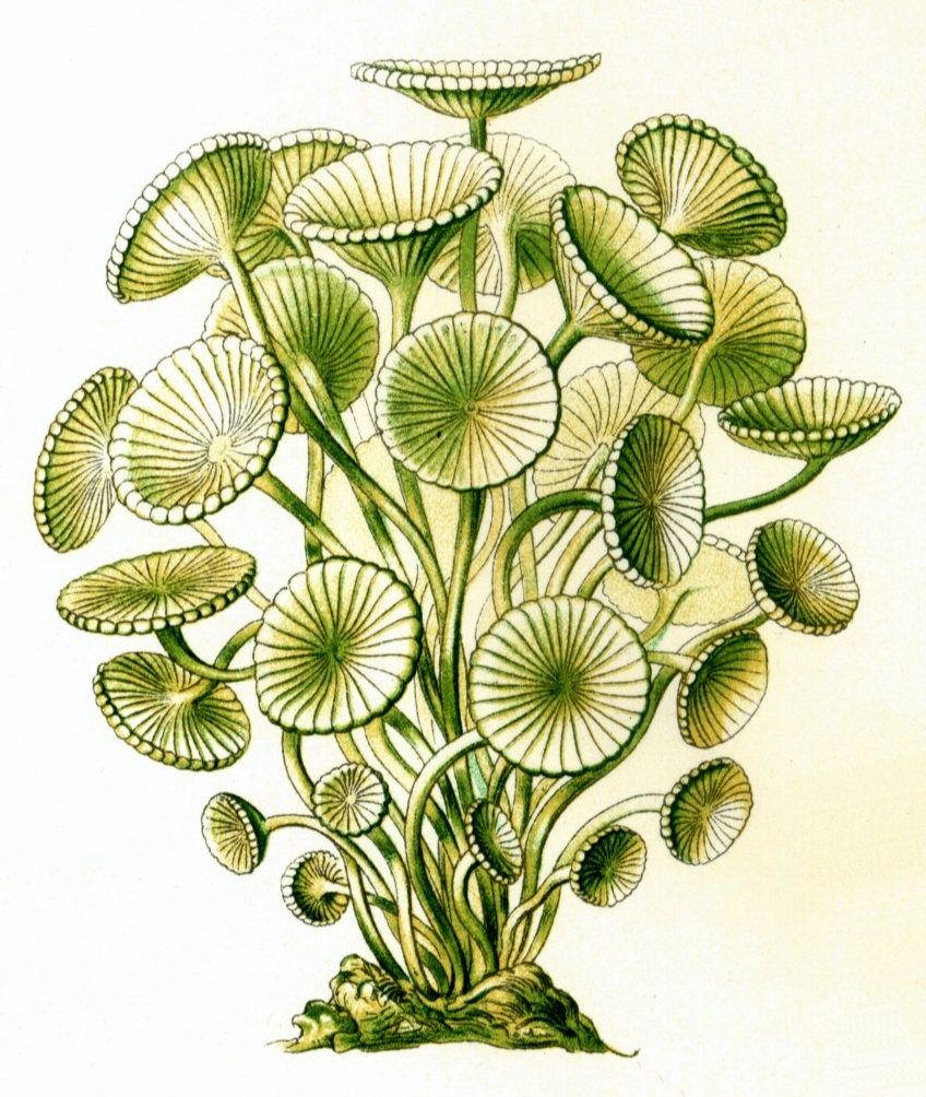 Acetabularia mediterranea (Lamouroux) = Acetabularia acetabulum (Linnaeus) P.C.Silva, habitus